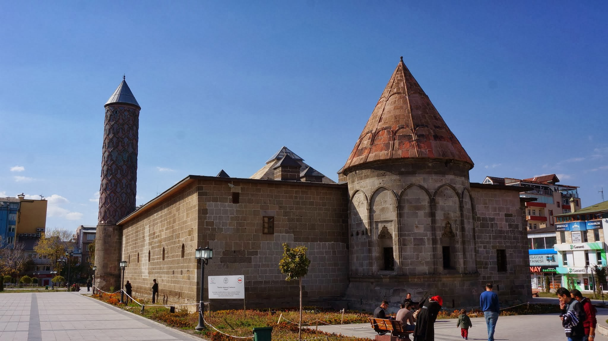 Erzurum, Turkey